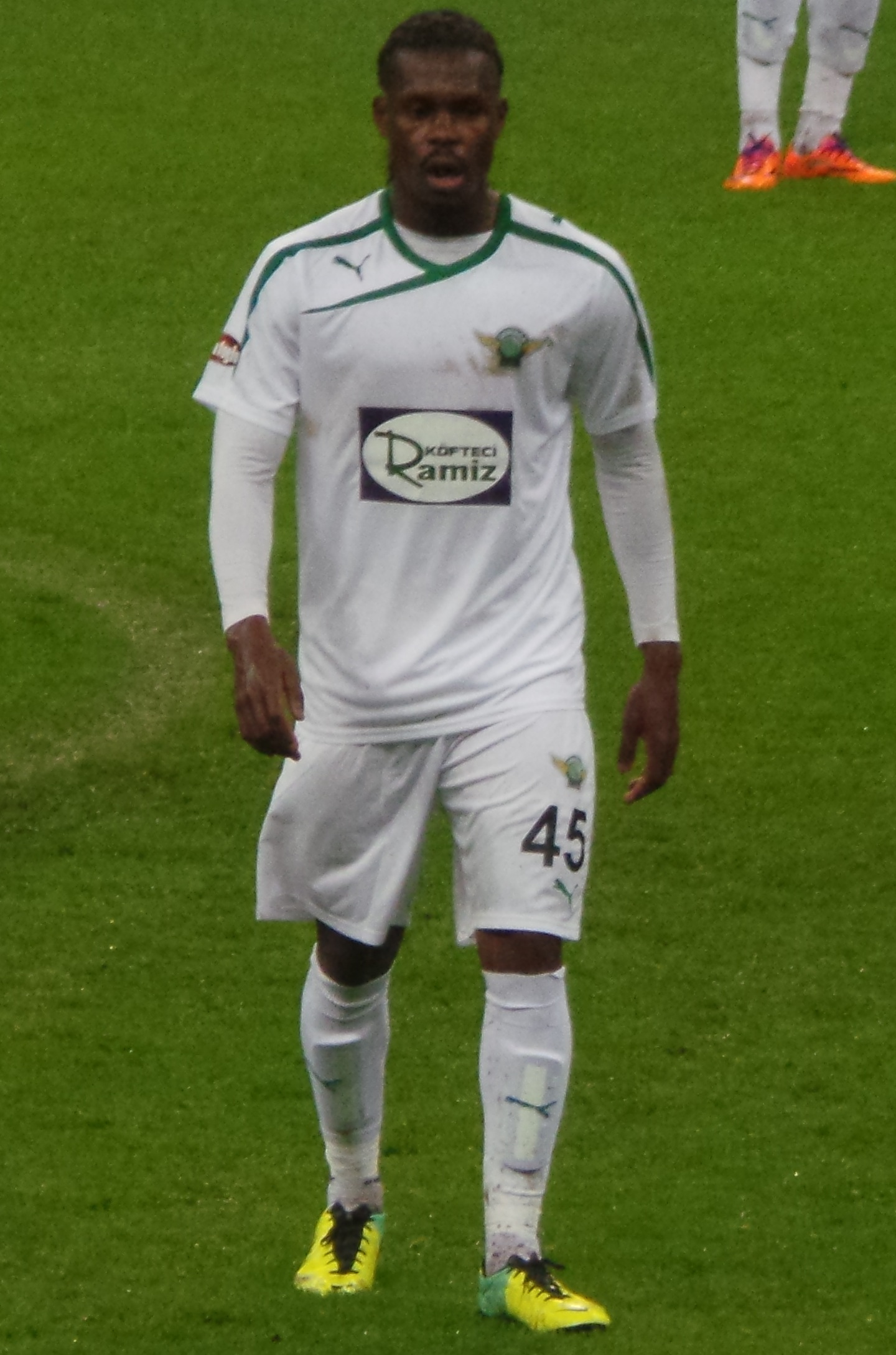 Wato Kuaté